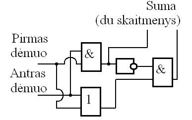 Dvejetainis pussumatorius.